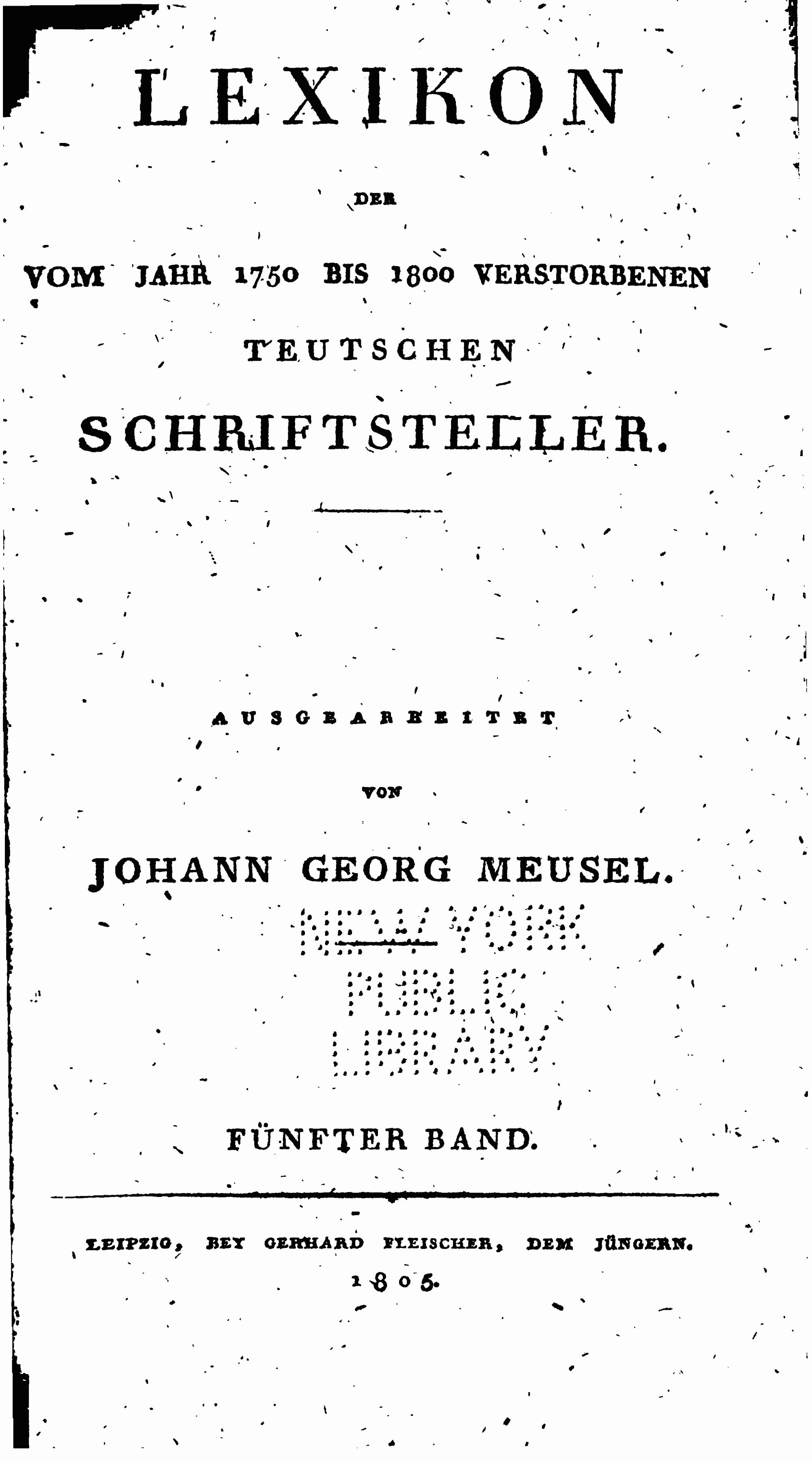 Lexikon der vom Jahr 1750 bis 1800 verstorbenen teutschen Schriftsteller, Band 5